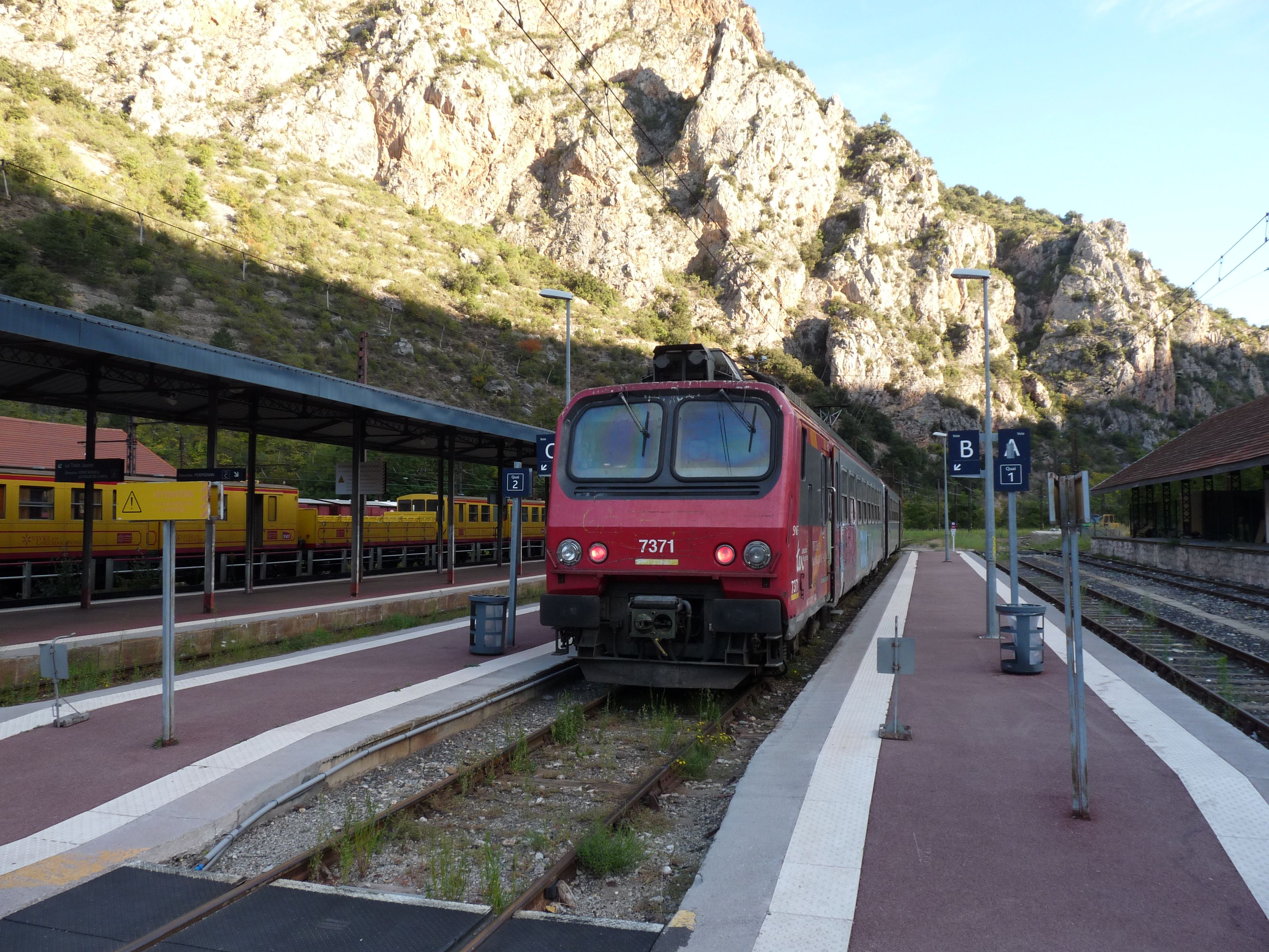 De ochtendtrein uit Perpignan